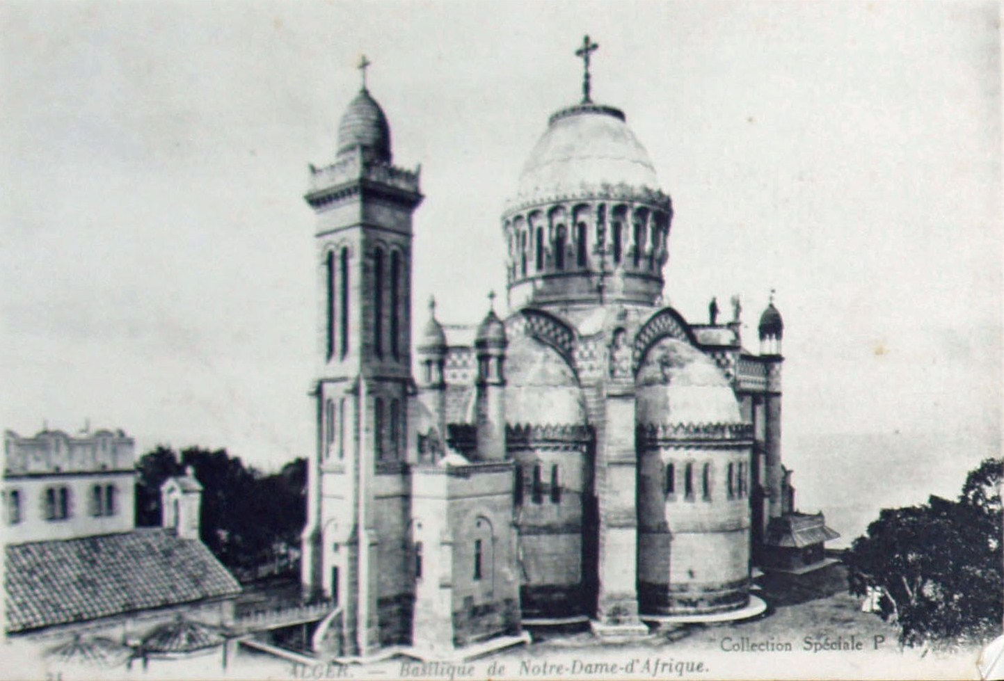 Carte postale Collection Spéciale P.A (poste aux armées?) expédiée en 1916 d'une série sur le département d'Alger. N°21 Notre-Dame-d'Afrique.